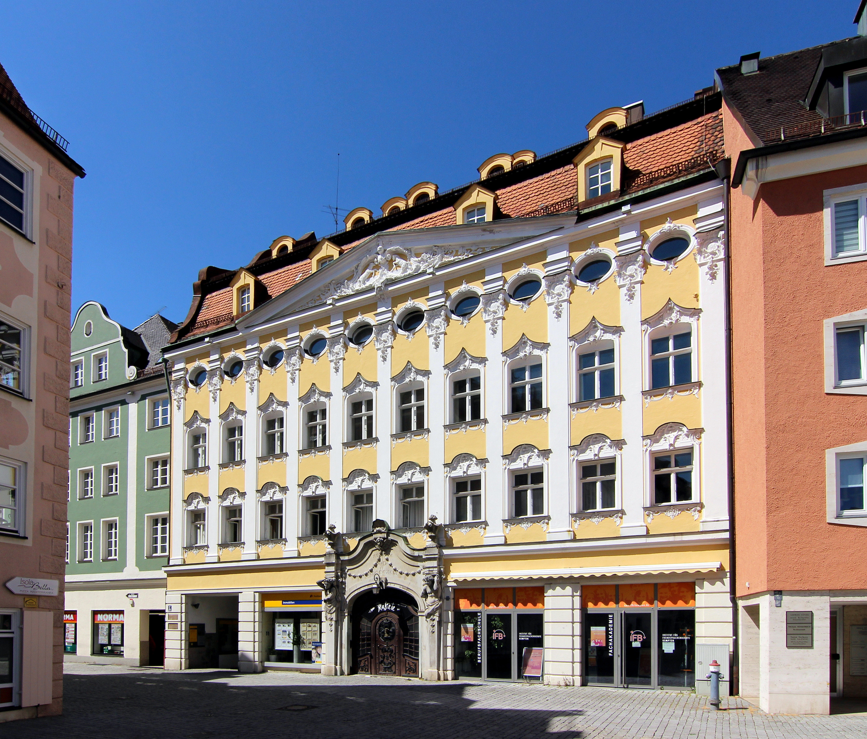 Prunkvolle Fassade des Londoner Hofs, Kempten